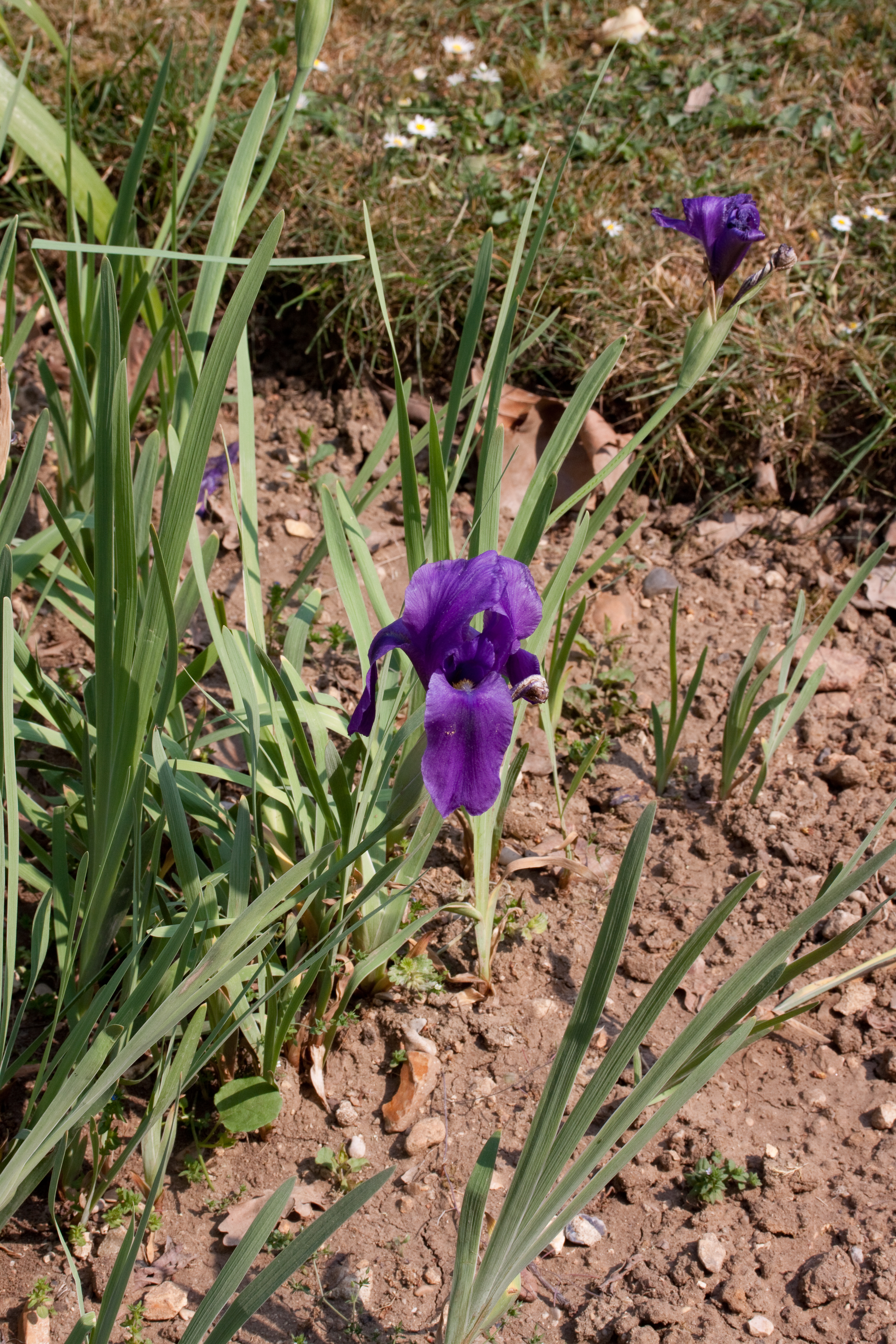 Fleur d'Iris hoogiana au Jardin des Plantes, Paris